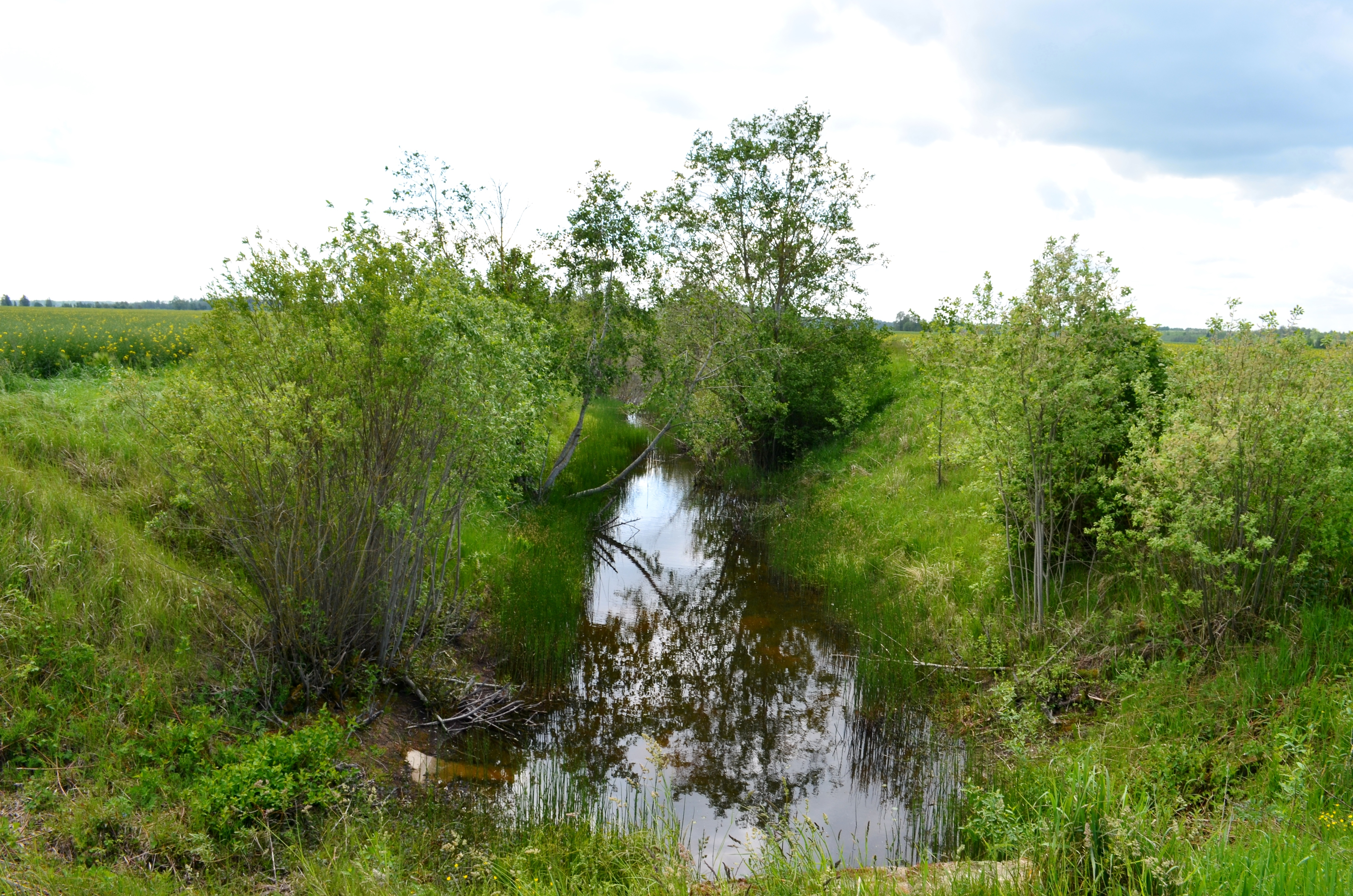 Alanta prie Užubalių, Panevėžio raj.